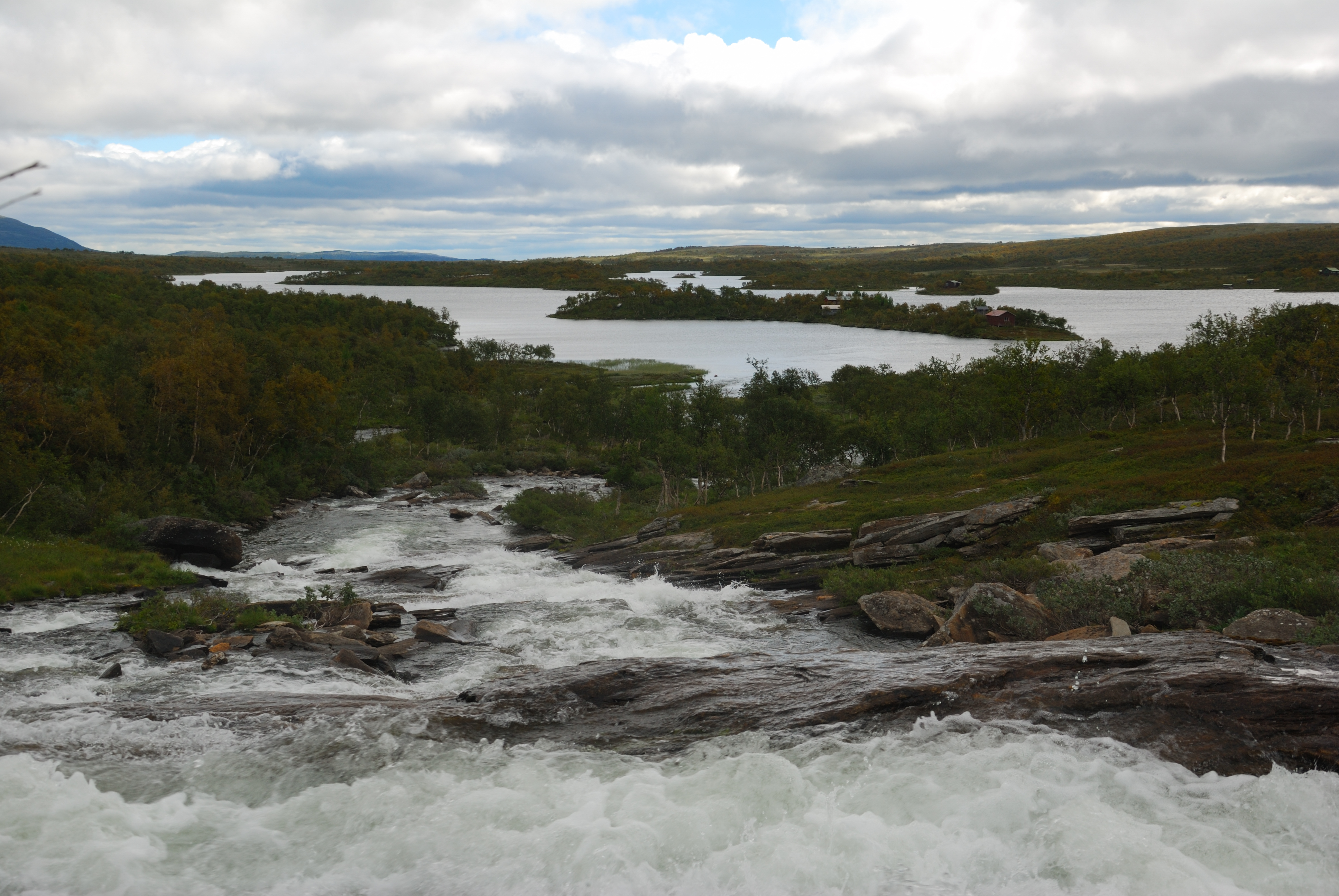 Östra Helagsån och Öjön augusti 2011.